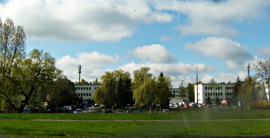 Agromet